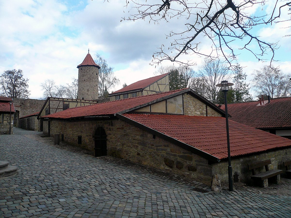 Kirchenburg Ostheim, Östliche Gaden und Pulverturm